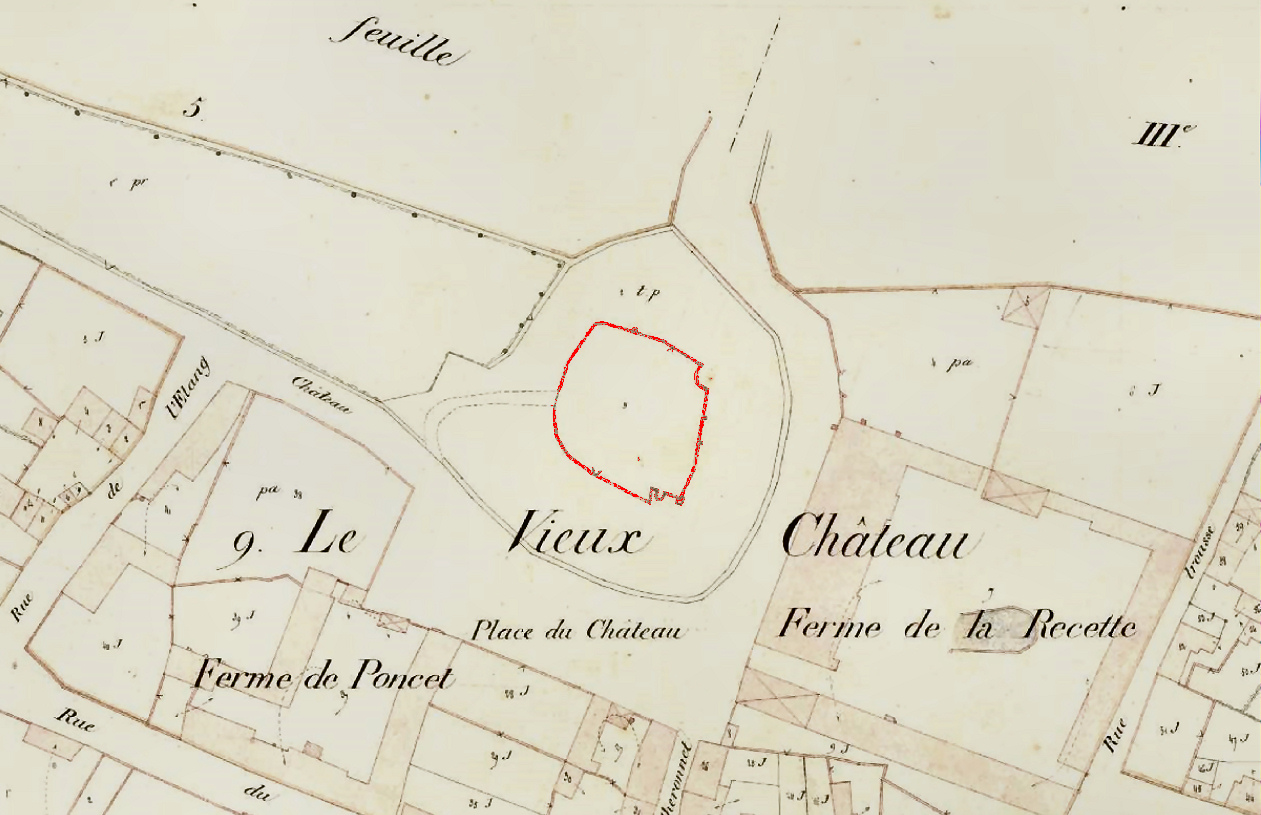 Vestiges du château des Barres à Oissery.